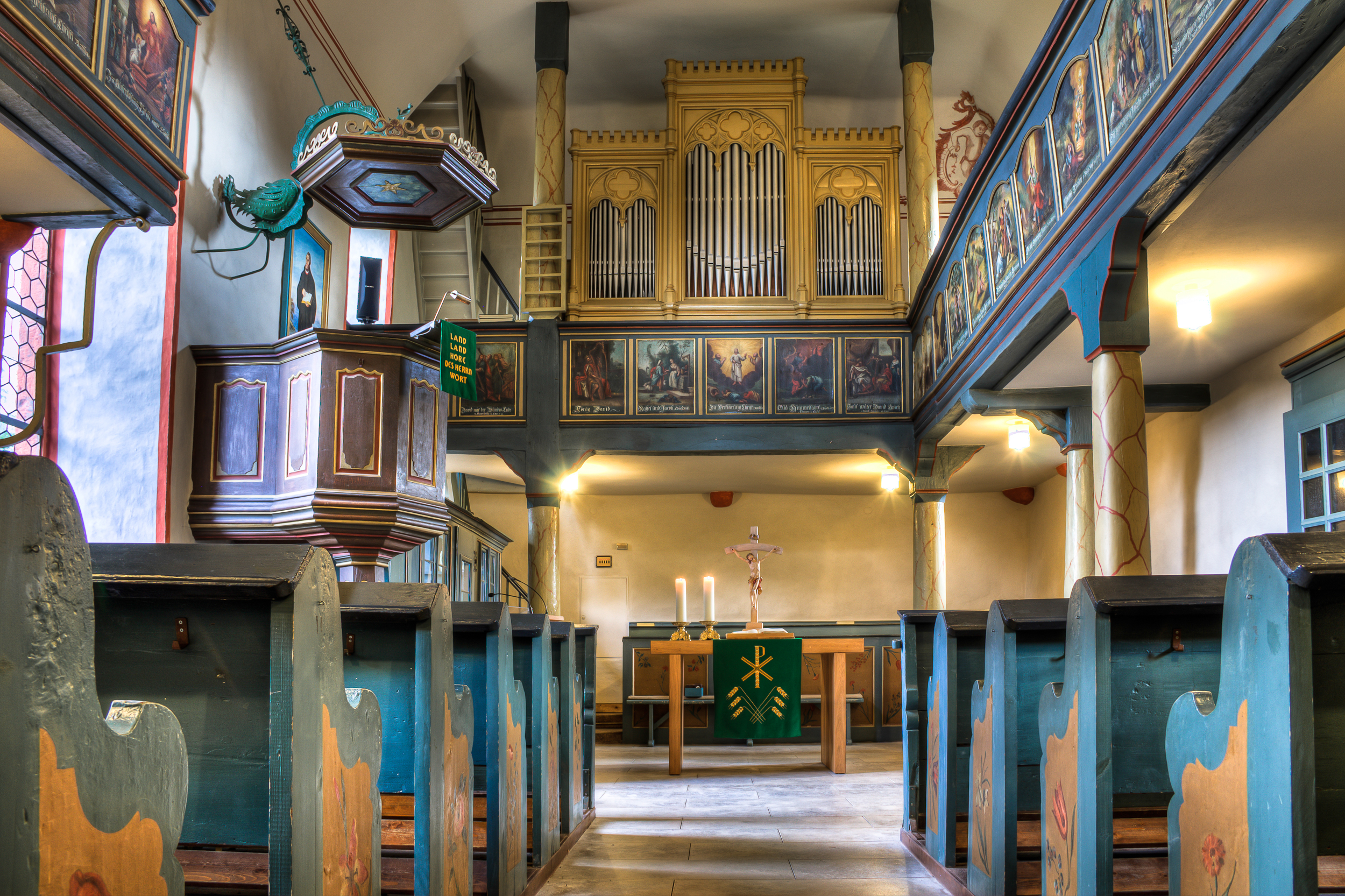 Evangelische Kirche Albach, Gemeinde Fernwald, Landkreis in Hessen, Deutschland